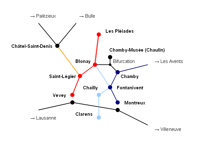 Situationsskizze der Bahnstrecken der Museumsbahn Blonay–Chamby (BC) und der ehemaligen Chemins de fer électriques Veveysans (CEV) heute Transports Montreux–Vevey–Riviera (MVR). Rot: Bahnstrecke Vevey–Saint-Légier–Blonay seit 1902 und Blonay–Les Pléiades seit 1911 Orange: Bahnstrecke Saint-Légier–Châtel-Saint-Denis 1904 bis 1969 Schwarz: Bahnstrecke Blonay–(Bifurcation–)Chamby seit 1902 und Bifurcation–Chamby-Musée (Chaulin) seit 1968 Dunkelblau: Bahnstrecke Montreux–Les Avants der Montreux–Berner Oberland-Bahn (MOB) seit 1901 Hellblau: Bahnstrecke der ehemaligen Strassenbahn Clarens–Chailly–Blonay (CCB) 1911 bis 1955